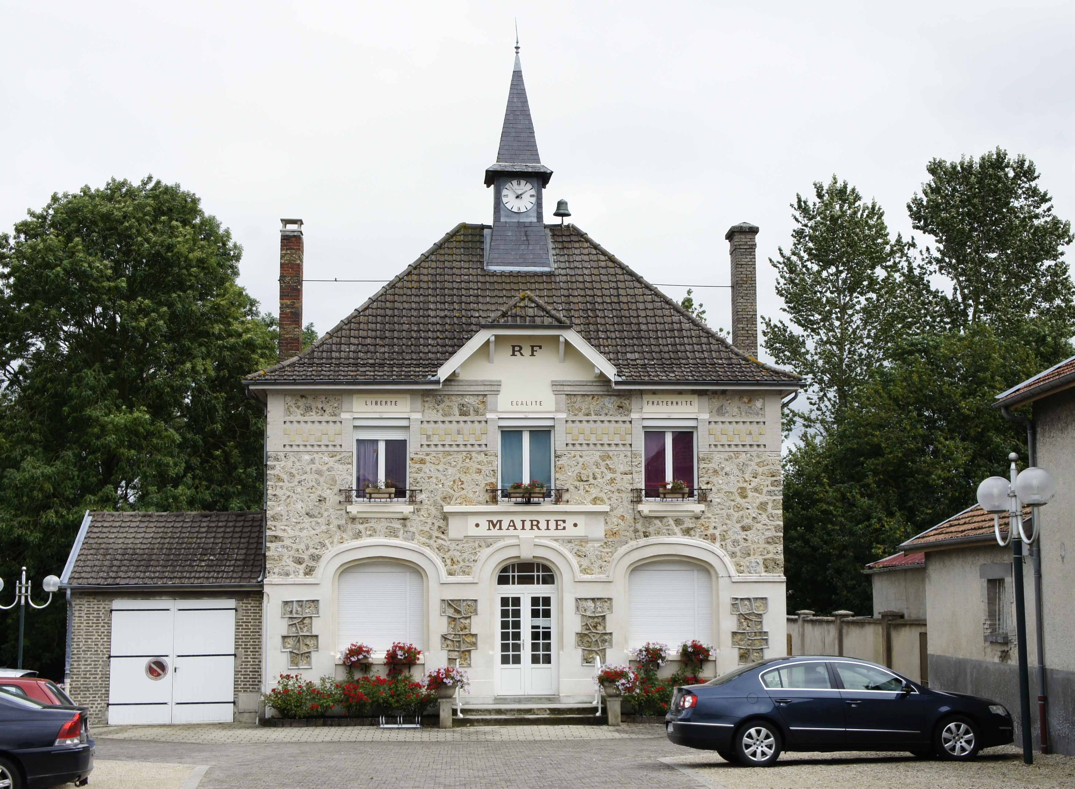 Vue de la mairie de Jonchery-sur-Suippe.